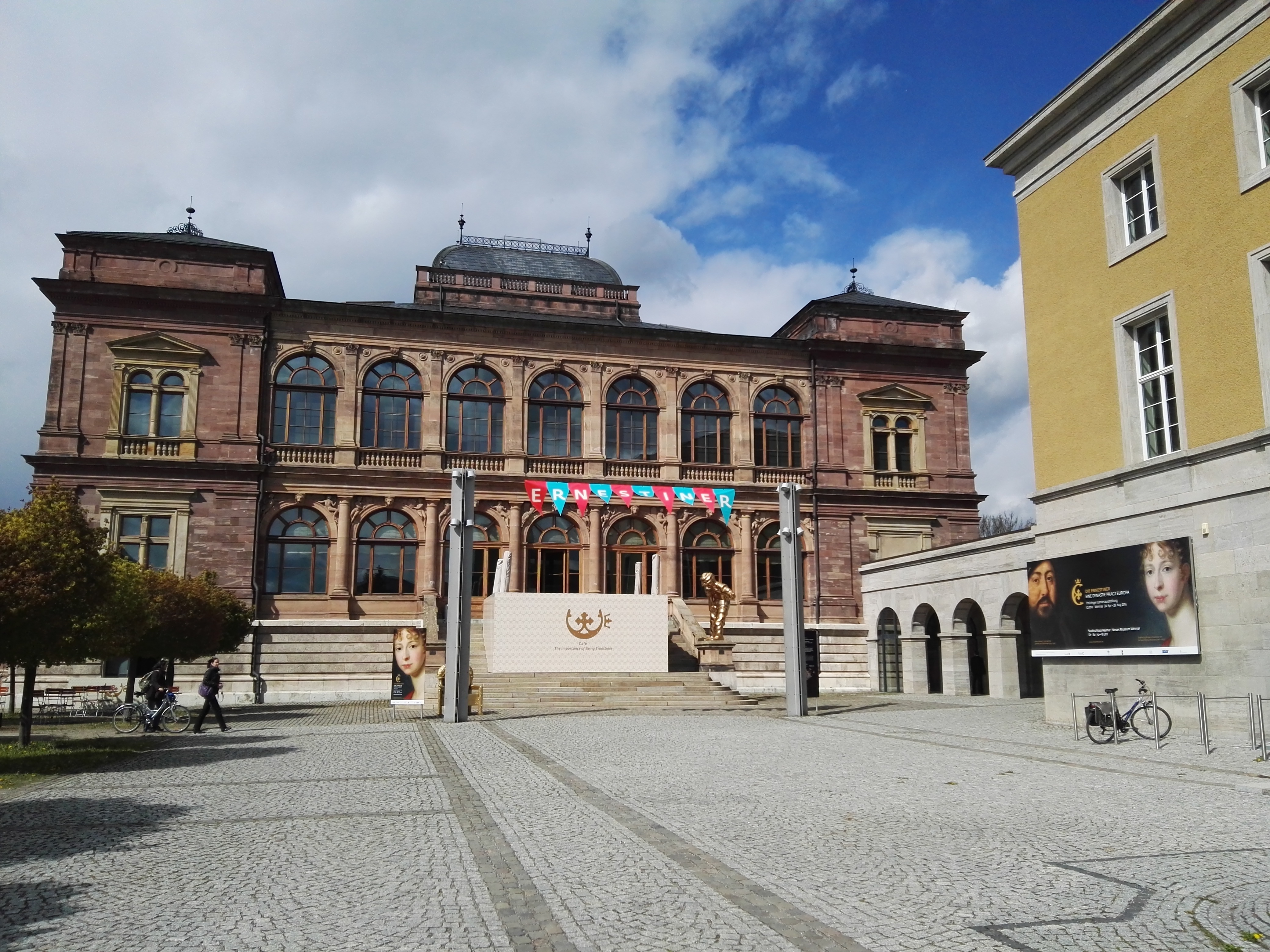 Thüringer Landesausstellung 2016 in Weimar, Neues Palais